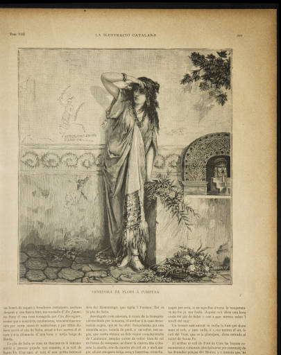 Ilustració Catalana, primera època, número 168 Data: 15 de Juliol de 1885 pàg. 201